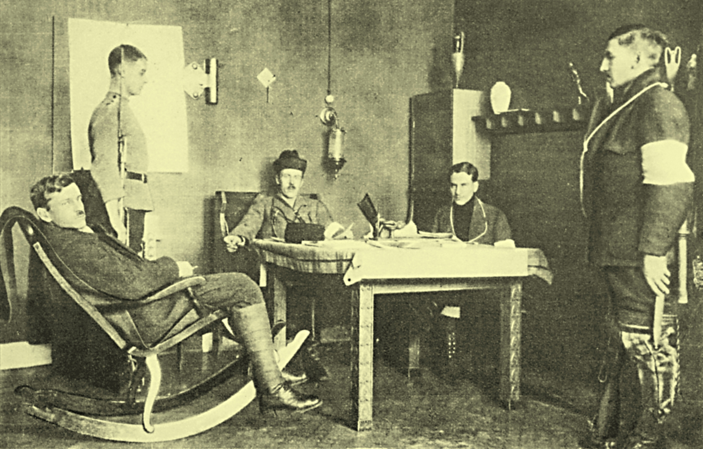 Mäntän pataljoonan esikunta. Pöydän päässä Mäntän sivustan päällikkö jääkäri Väinönheimo.